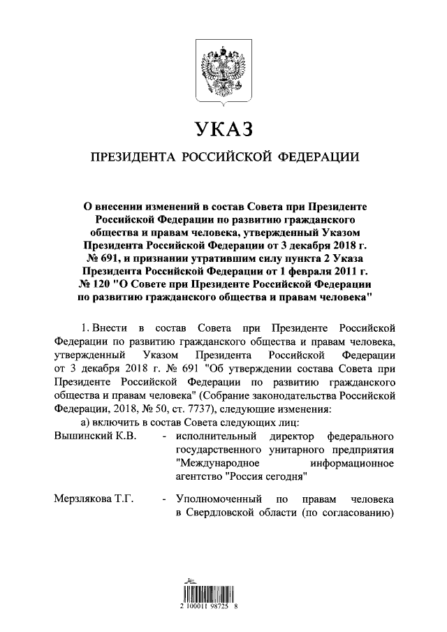 Указ Президента Российской Федерации от 21.10.2019 № 512 «О внесении изменений в состав Совета при Президенте Российской Федерации по развитию гражданского общества и правам человека», утвержденный Указом Президента Российской Федерации от 3 декабря 2018 г. № 691, и признании утратившим силу пункта 2 Указа Президента Российской Федерации от 1 февраля 2011 г. № 120 «О Совете при Президенте Российской Федерации по развитию гражданского общества и правам человека».